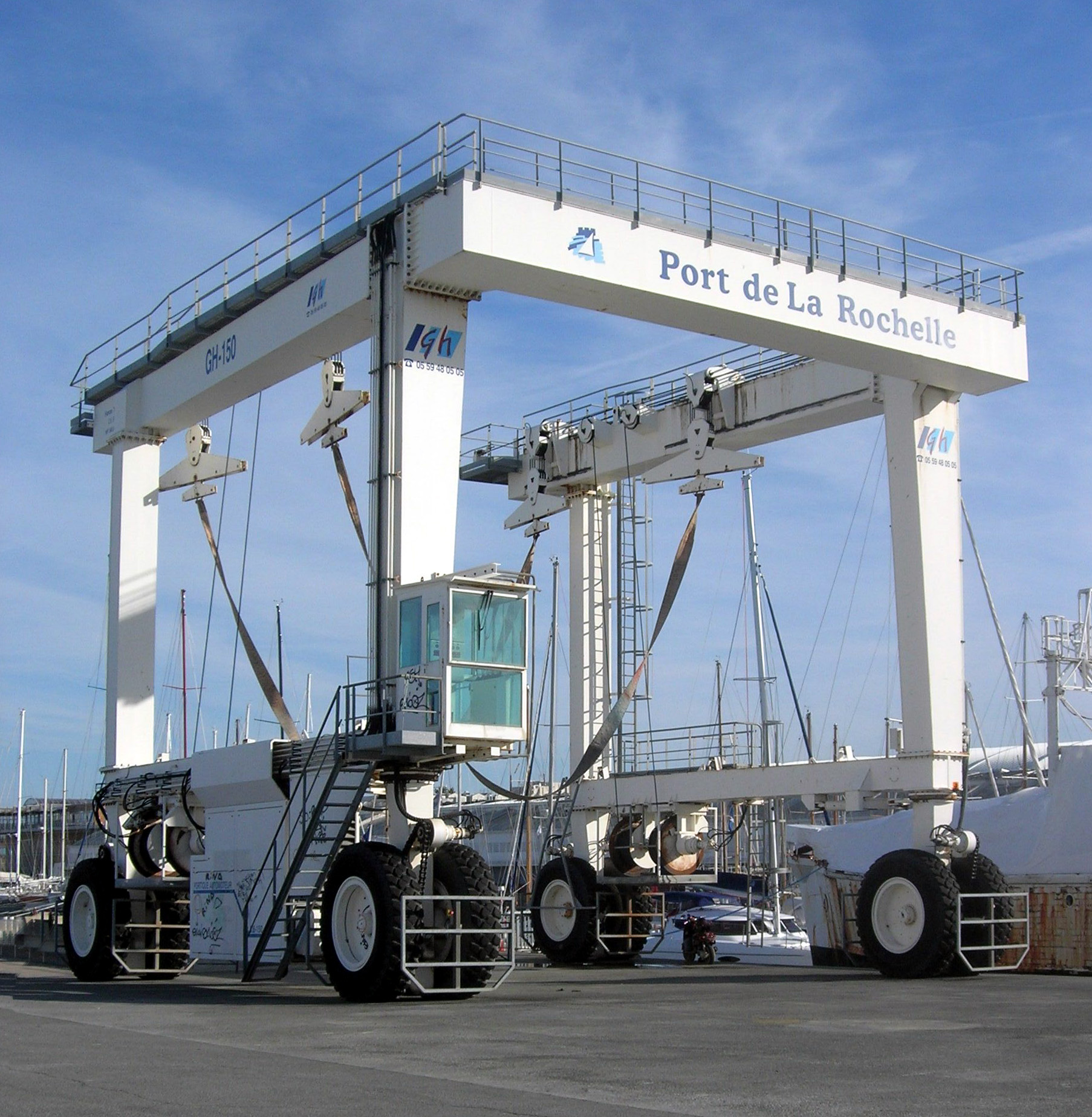 Description =Grue de manutention portuaire au port de La Rochelle Source =Photo taken by Remi Jouan Date =Octobre 2006 Author =Remi Jouan